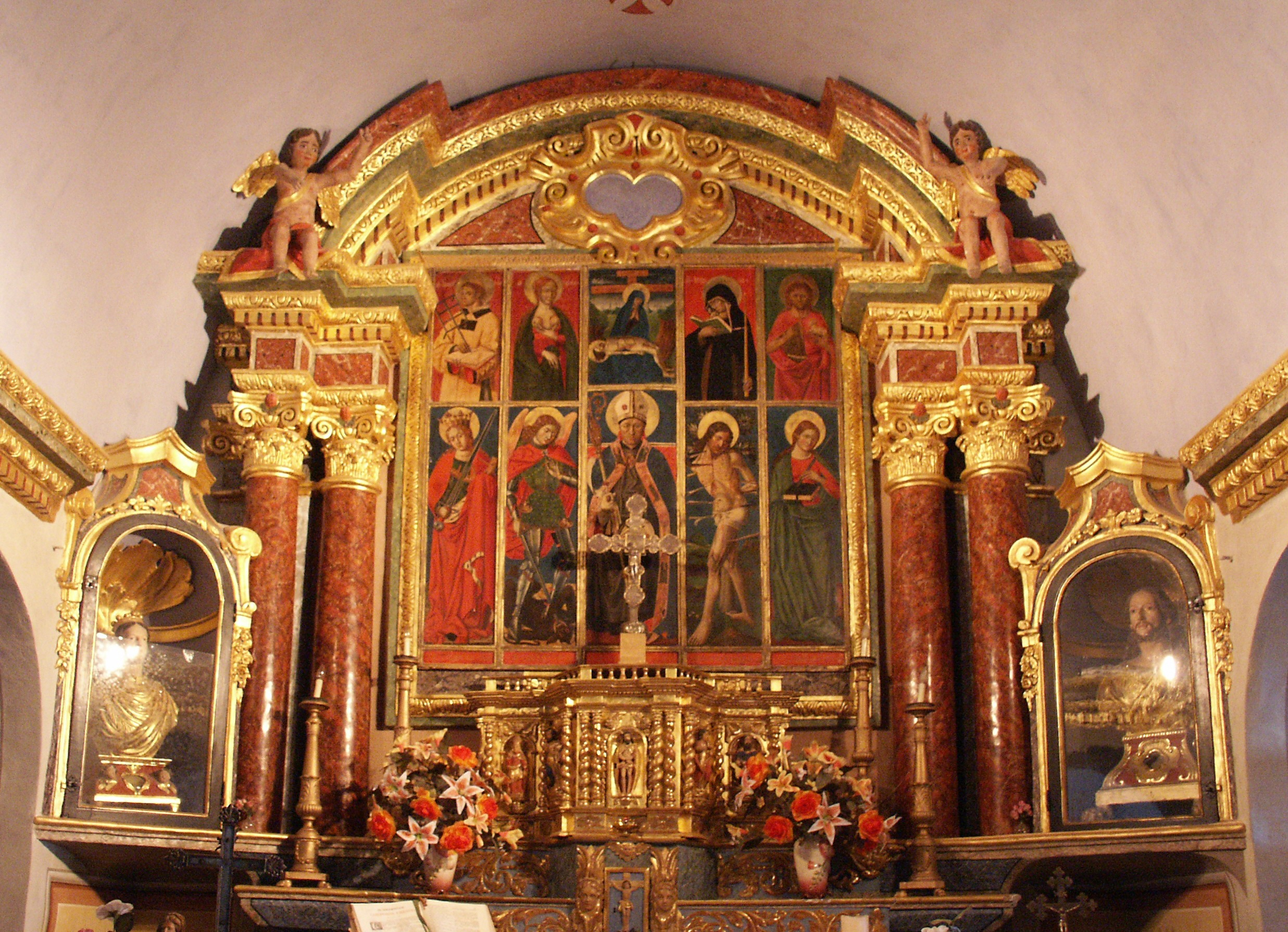 Rétable de St-Benoît - ( Attribué à Jacques Durandi - Mi-XVème )